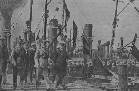 Marszałek Piłsudski, admirał Świrski i minister Prystor w Gdyni (Oryginalny podpis pod zdjęciem: Polska u wrót mocarstwowej potęgi. Marszałek [Józef Piłsudski] odbywa przegląd marynarki wojennej w Gdyni.